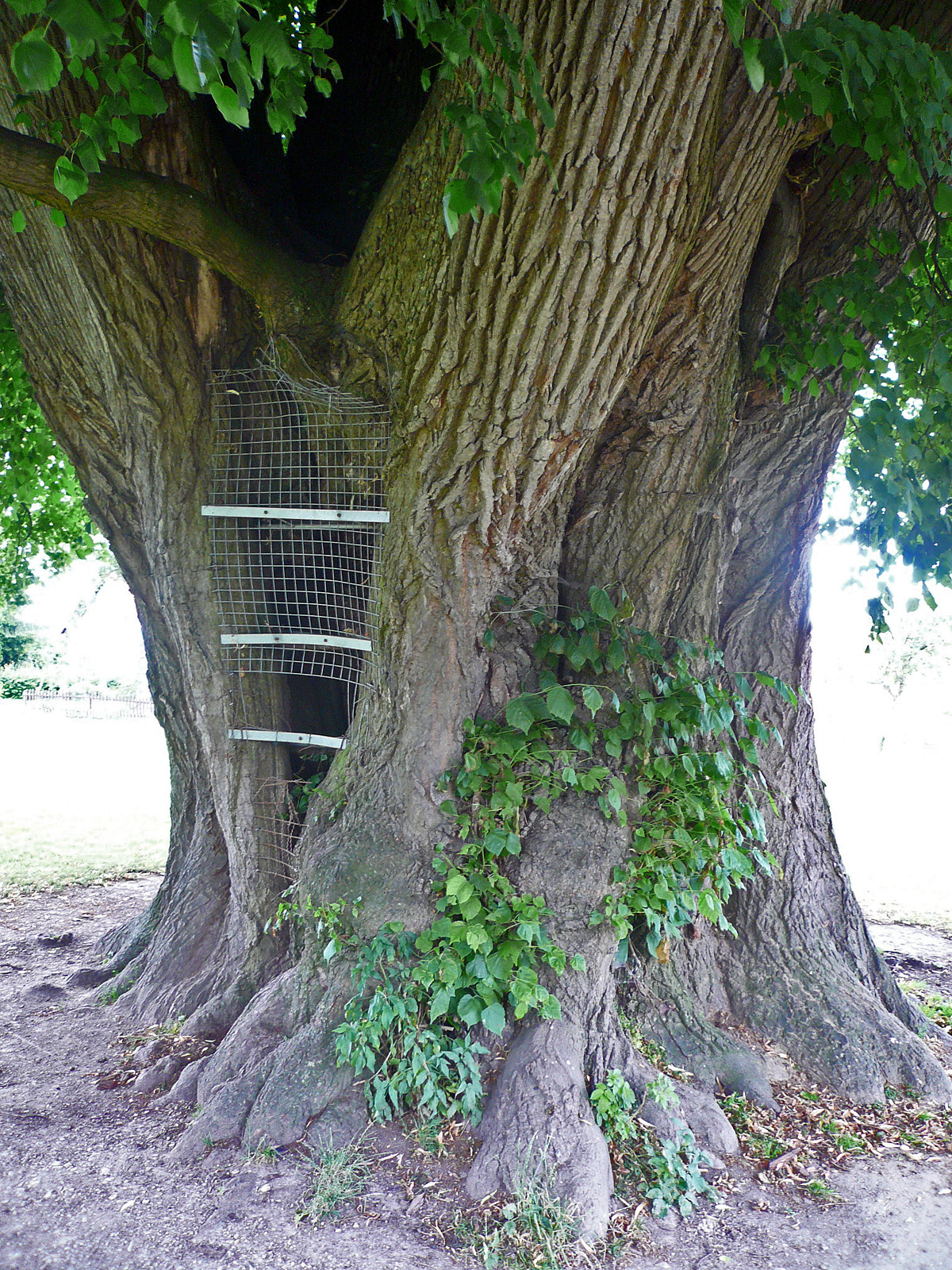 Apostellinde Gehrden